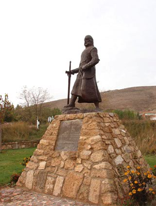 Fotografía Comarca del Jiloca